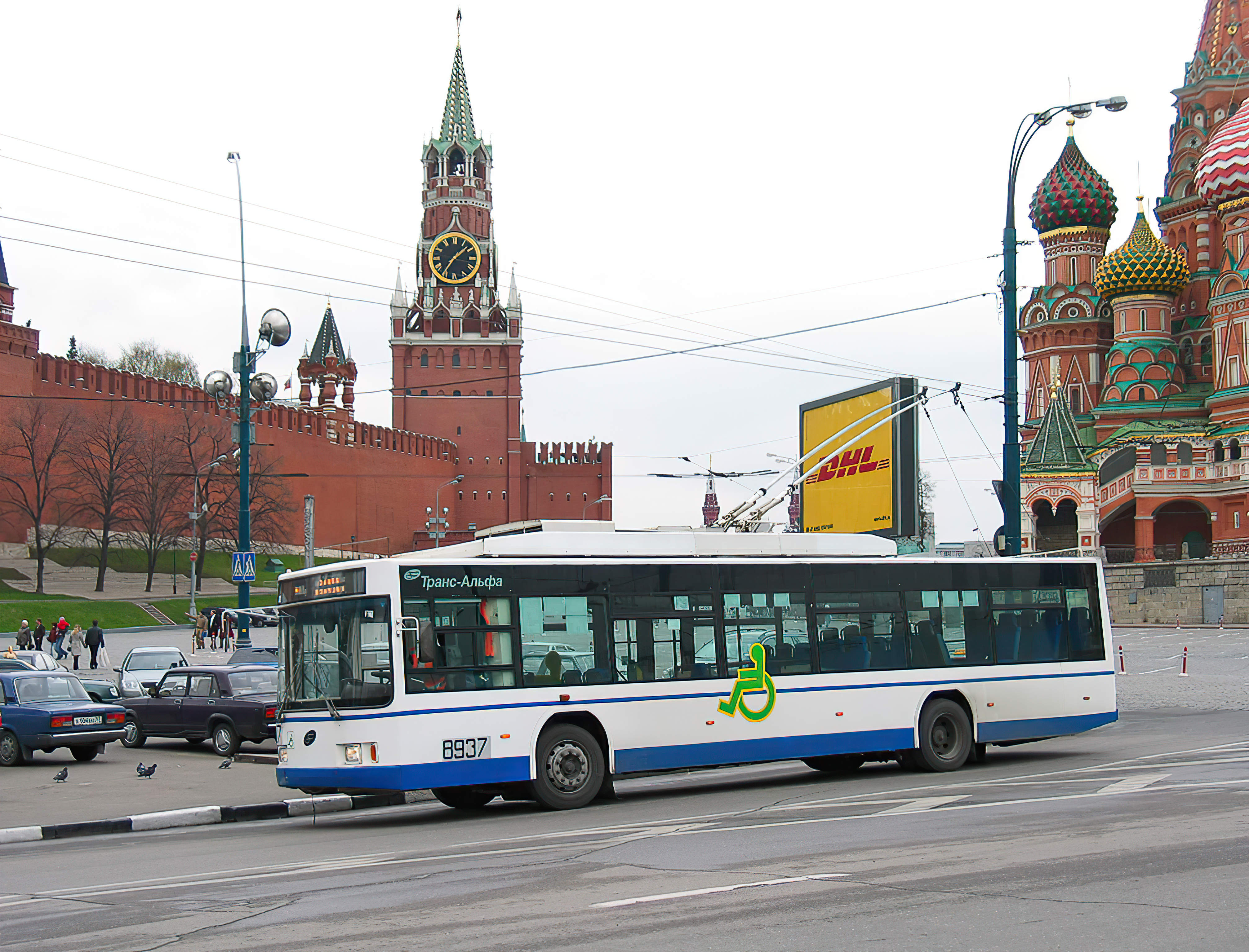 Троллейбус ВМЗ-5298.01 № 8937 на Васильевском спуске